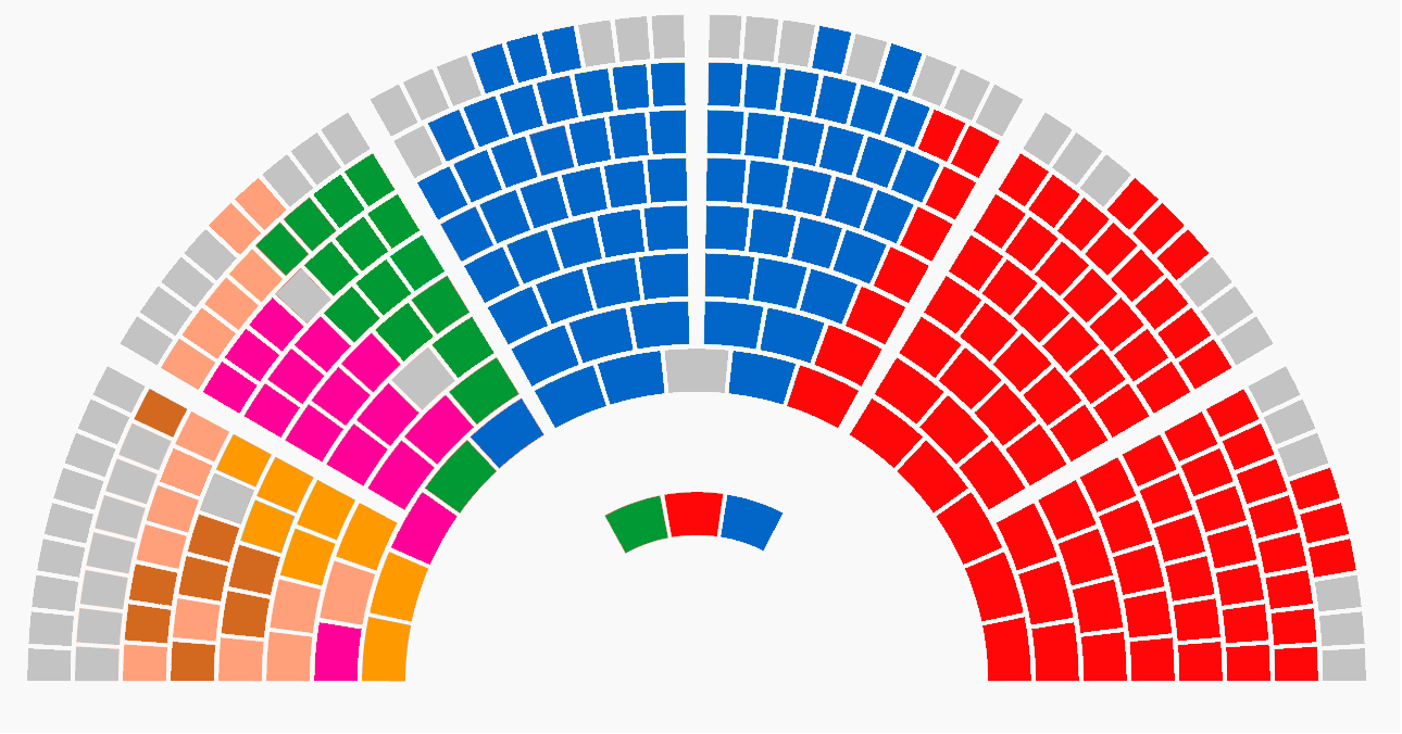 Représentation des députés de la Ire législature de l'ARP (Tunisie)